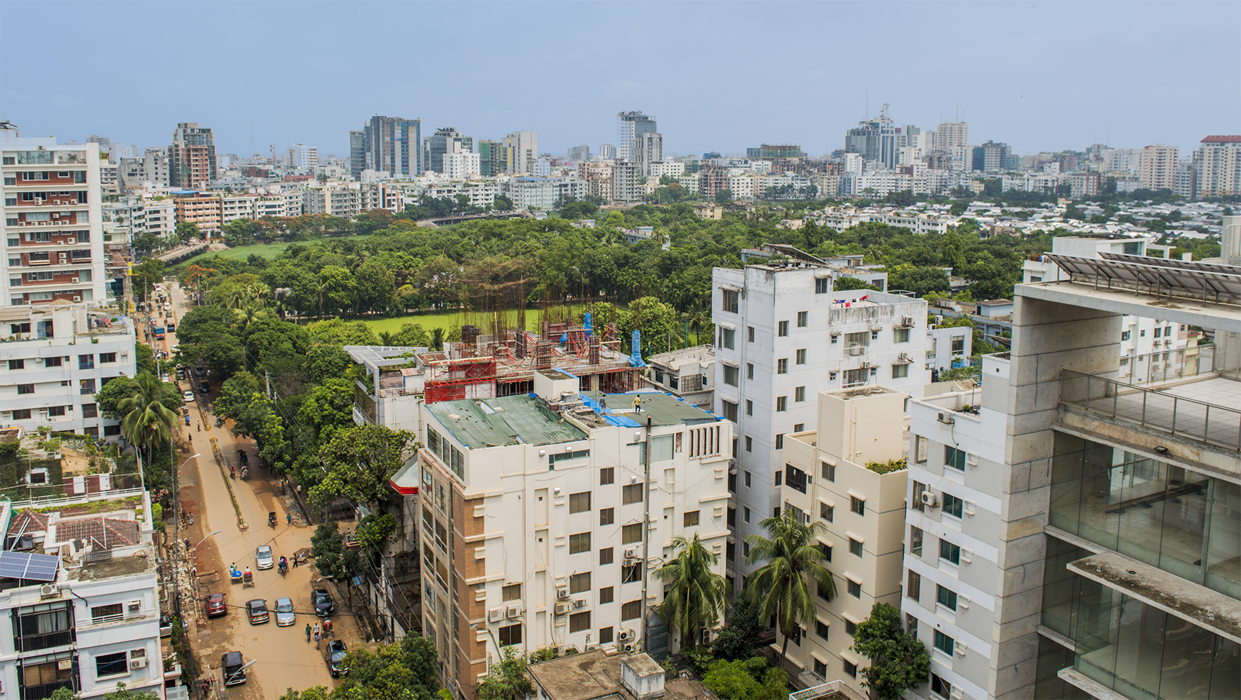 Dhaka